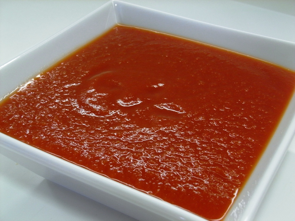 Un recipiente con tomate natural triturado. See post in My blog at Link